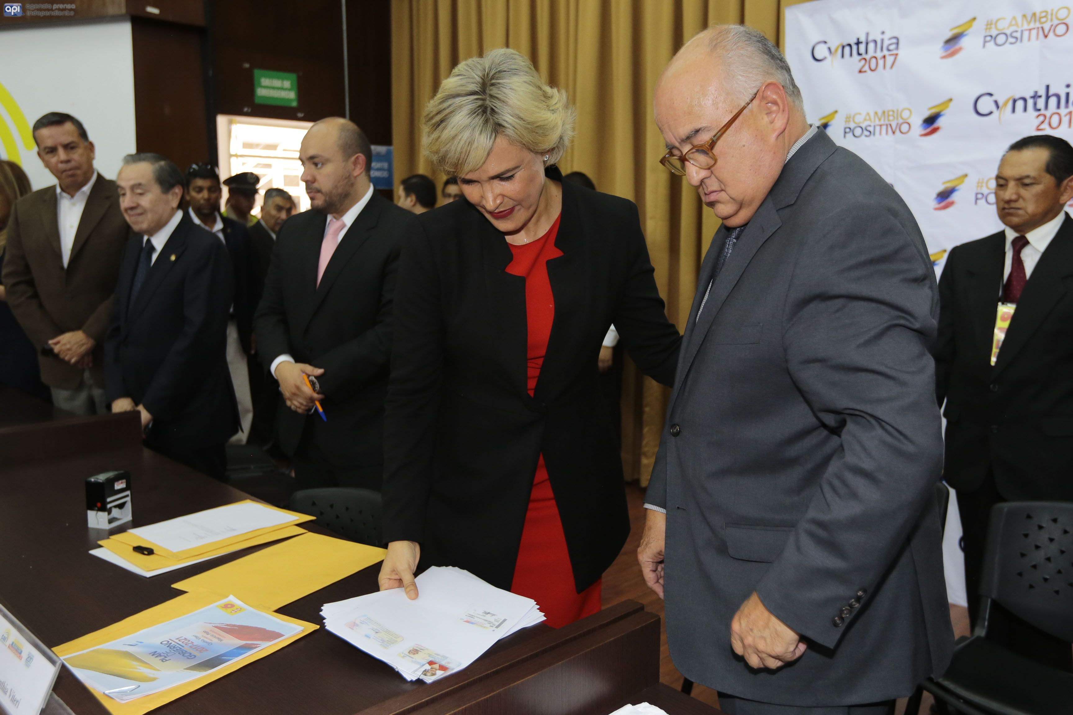 Cynthia Viteri al momento de inscribir su candidatura a la Presidencia de la República del Ecuador en 2017, junto a Mauricio Pozo.